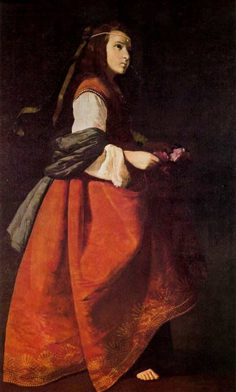 Santa Casilda. Colección Plandiura